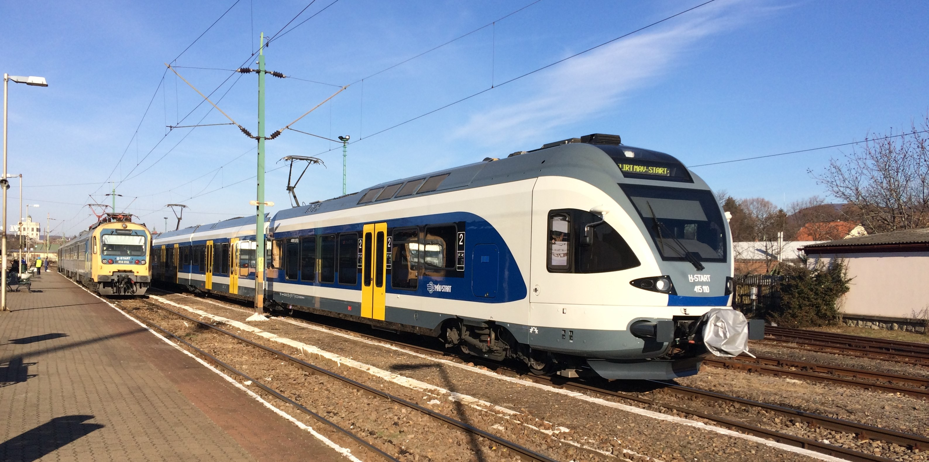 A MÁV Flirt motorvonata az egri vasútállomáson